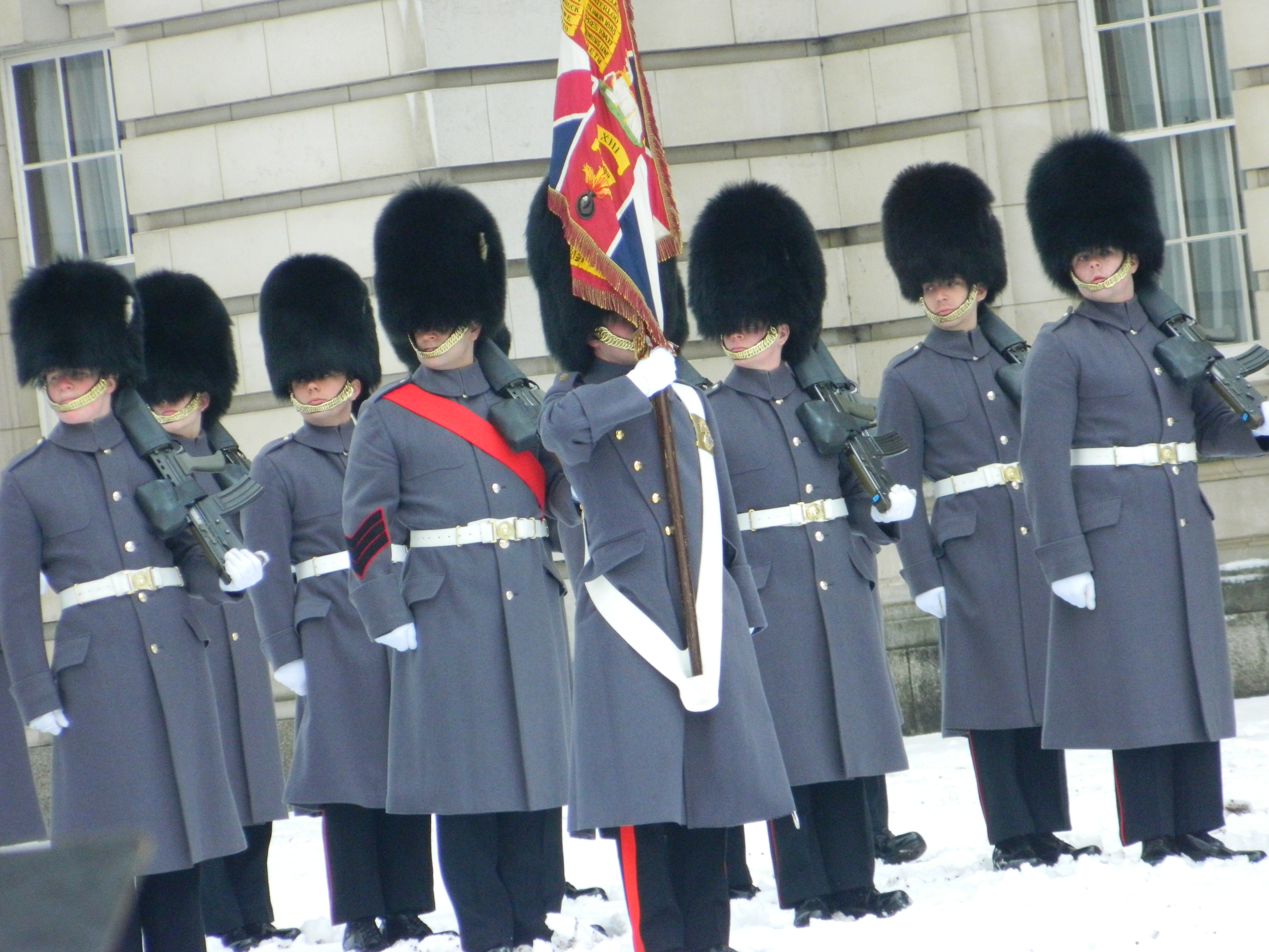 London